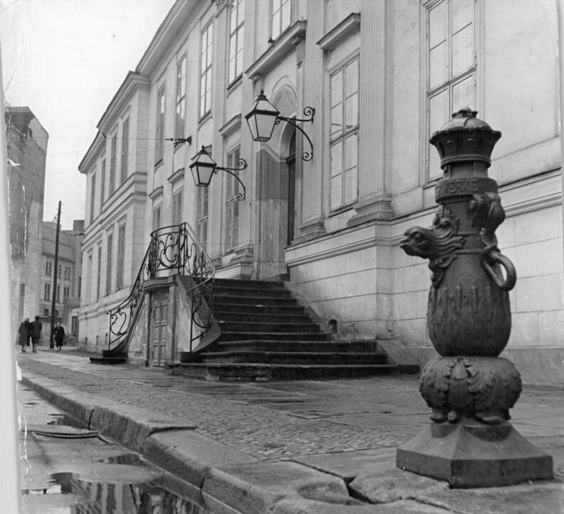 Berlin, Am Kupfergraben, Altbau, Institut Zentralbild Ulmer-Baier Ho. 17.4.1958 Zum 100. Geburtstag von Max Planck Die Deutsche Akademie der Wissenschaften zu Berlin, der Verband Deutscher Physikalischer Gesellschaften in der Bundesrepublik und die Physikalische Gesellschaft in der DDR bereiten für den 24. und 25.5.1958 Gedenkfeiern zu Ehren von Max Planck vor. Der große deutsche Physiker wurde vor 100 Jahren am 23. April 1858 in Kiel geboren. Während der Festsitzung der Deutschen Akademie der Wissenschaften in der Berliner Staatsoper wird Nobelpreisträger Prof. Dr. Otto Hahn (Göttingen) eine Max-Planck-Büste übergeben, die im Hause der Physikalischen Gesellschaft in der DDR aufgestellt werden soll. Dieses Haus in Berlin, Am Kupfergraben 7, in dem Prof. Magnus das erste Deutsche Physikalische Institut errichtete und in dem wenige Jahre darauf die "Deutsche Physikalische Gesellschaft" gegründet wurde, wird am 24.4.1958 vom Magistrat von Groß-Berlin der physikalischen Gesellschaft in der DDR übergeben. UBz: Das Haus des ehemaligen Deutschen Physikalischen Instituts in Berlin, Am Kupfergraben 7.